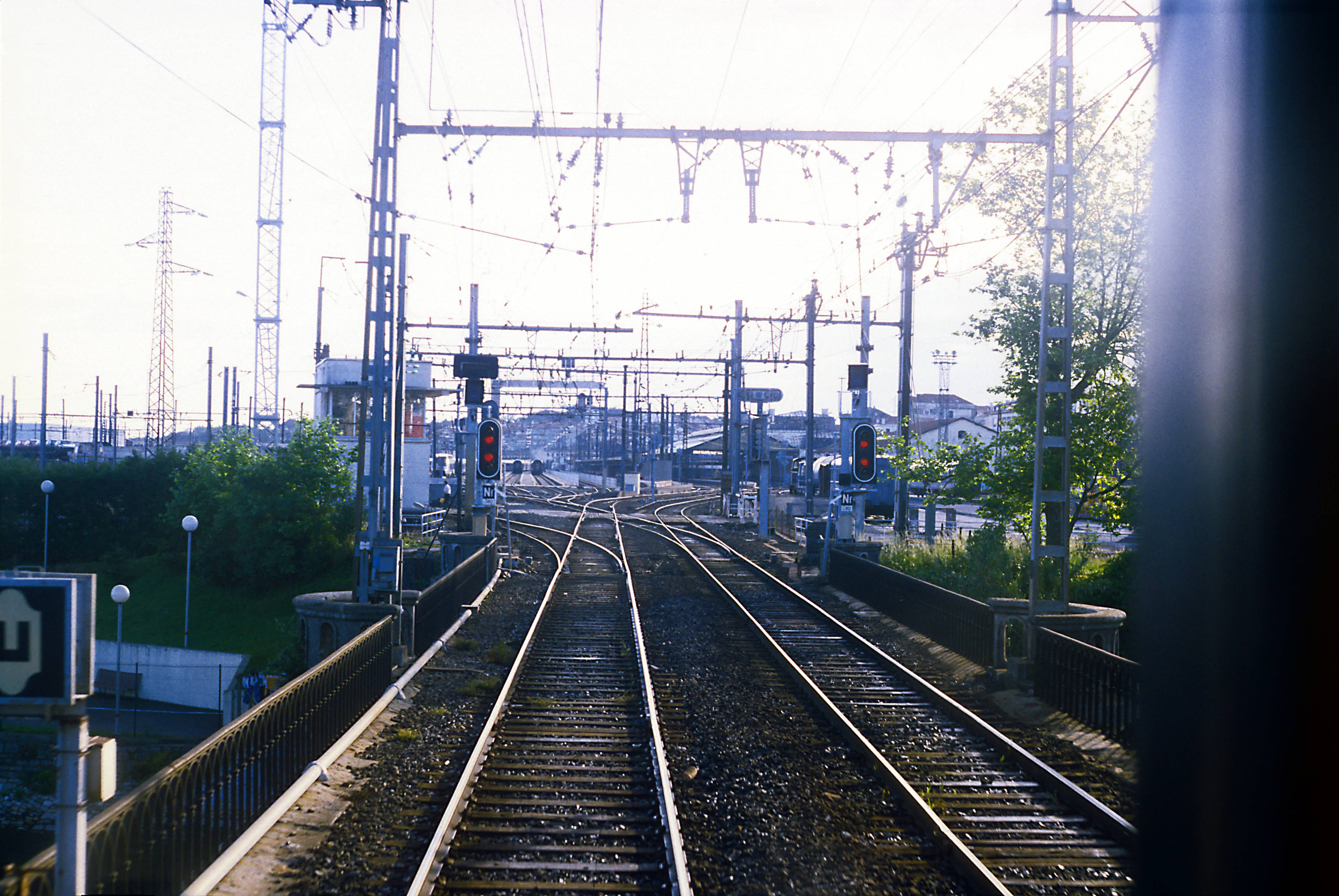 Links Breit-, rechts Regelspur. Im Bahnhofsbereich müssen die RENFE-Maschinen mit der halben Spannung (1,5kV) auskommen.